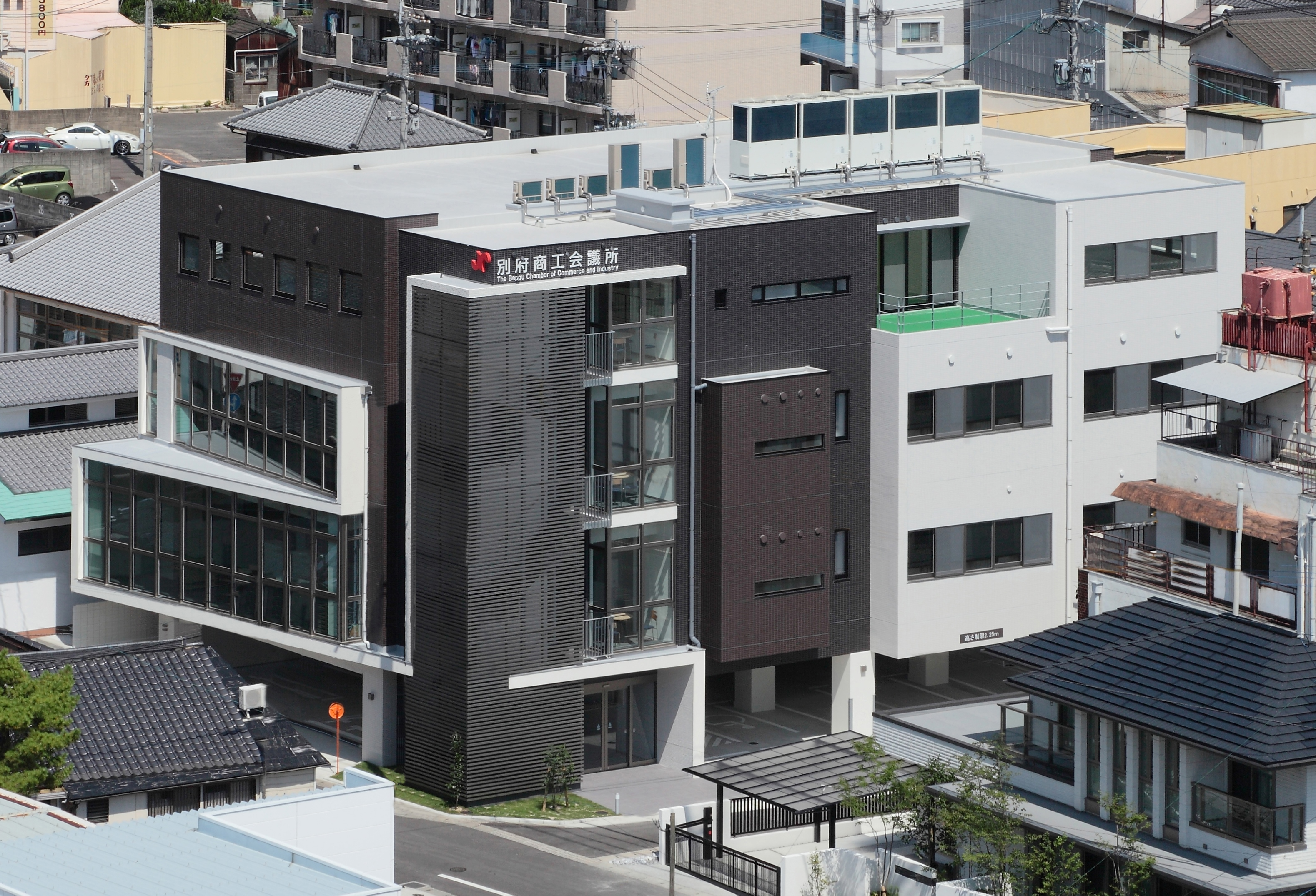 別府商工会館 2014年7月25日撮影